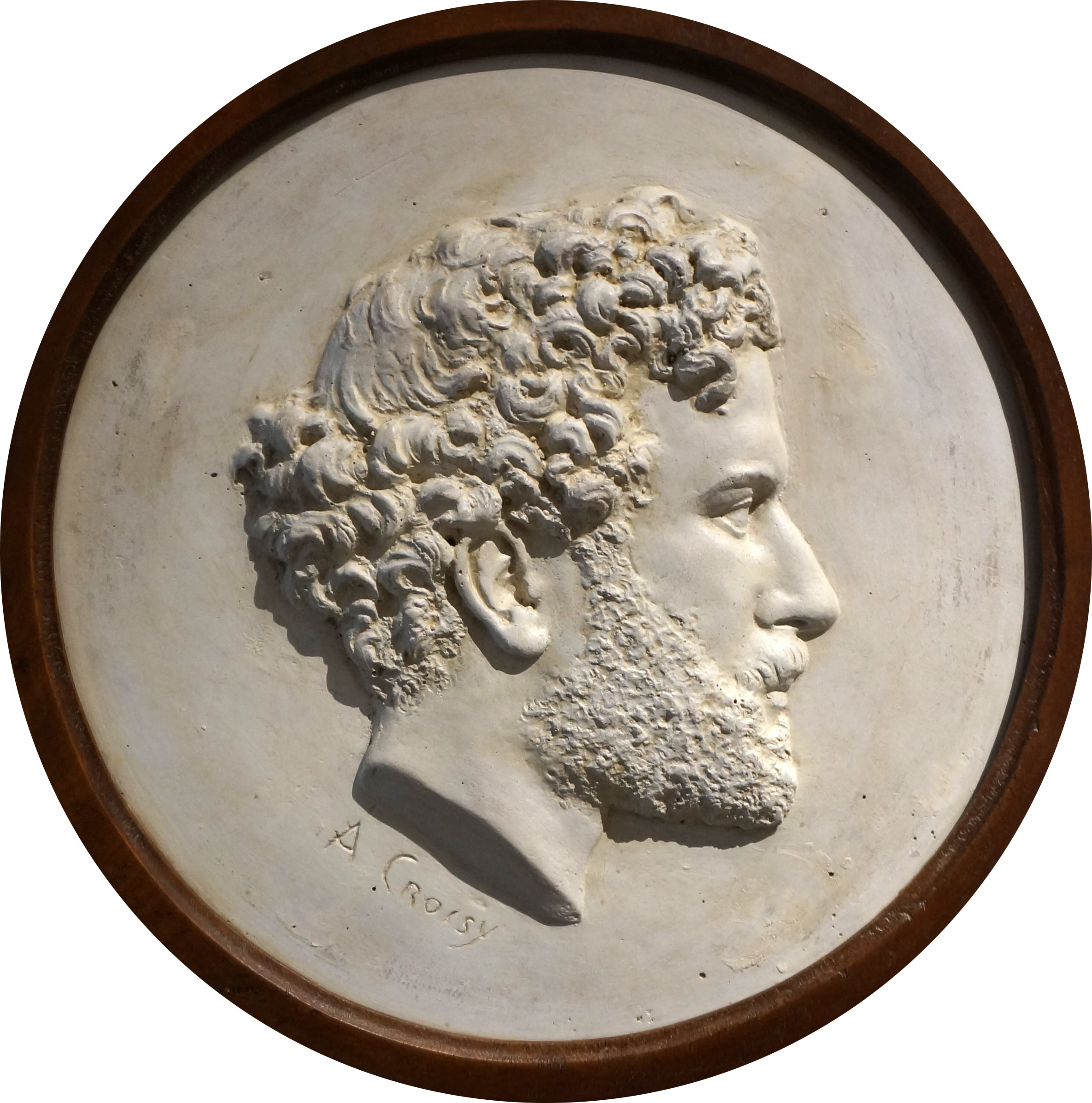 M. Marthe, percepteur à Charleville, cartel de 2018, par Aristide-Onésime Croisy .